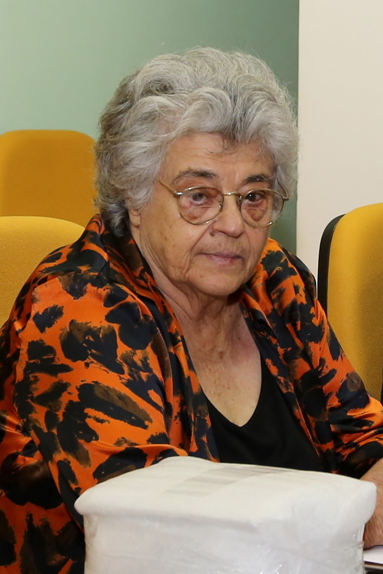 Reunião com a diretora da Fund. Museu do Homem Americano, Niède Guidon, e o deputado Paes Landim. A pauta era o Parque Nacional Serra da Capivara.